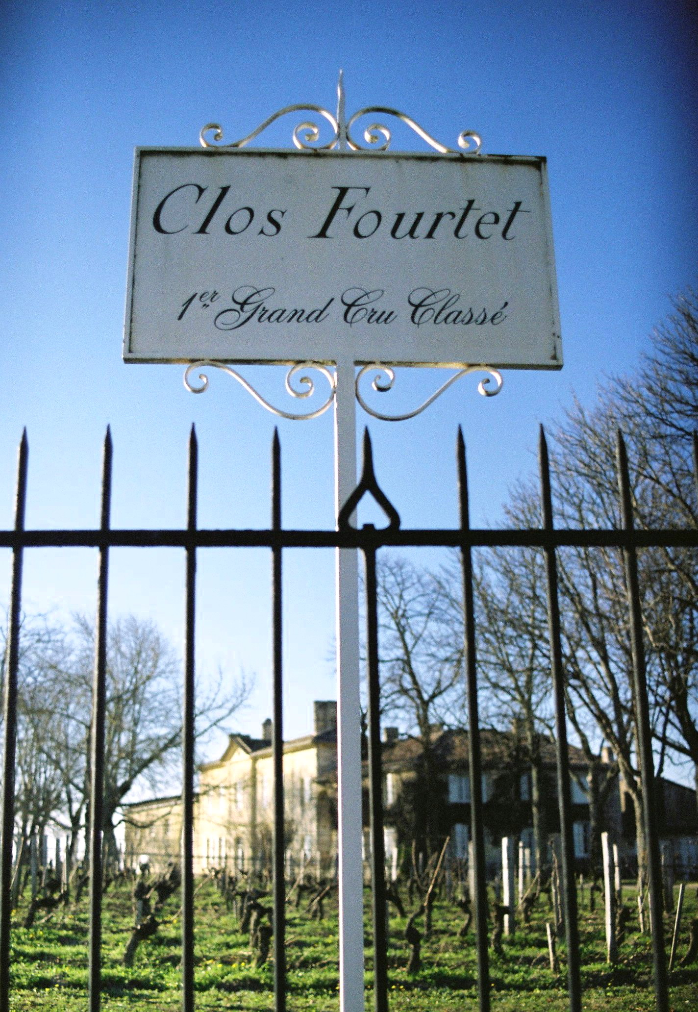 Portail et château du Clos Fourtet